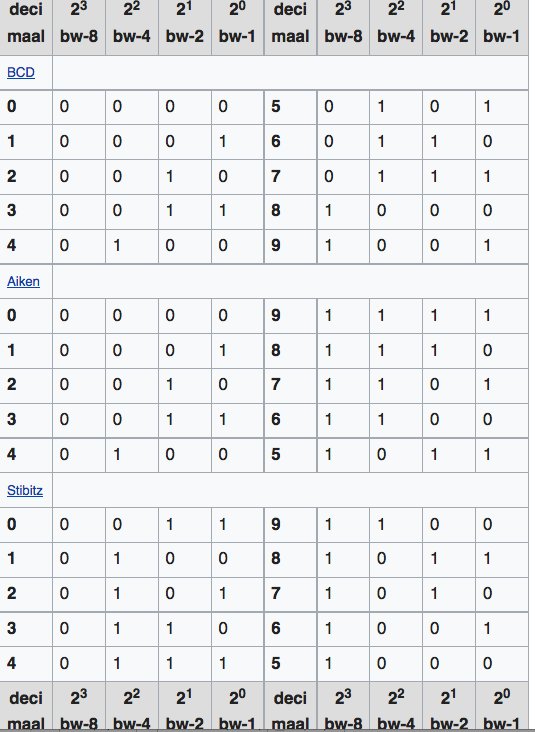 Drie manieren om de tien cijfers 0 t/m 9 binair in geheugen of op schijf van 'n computer te zetten.